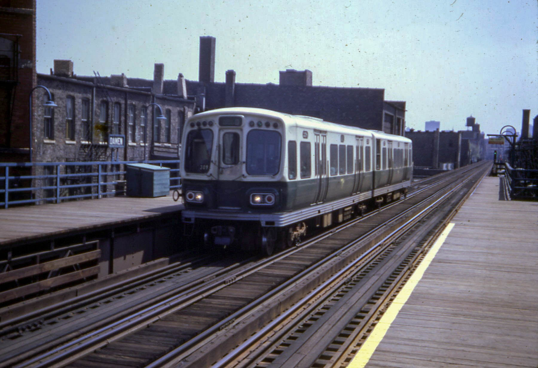 19670501 06 CTA Logan Square L @ Damen Ave.